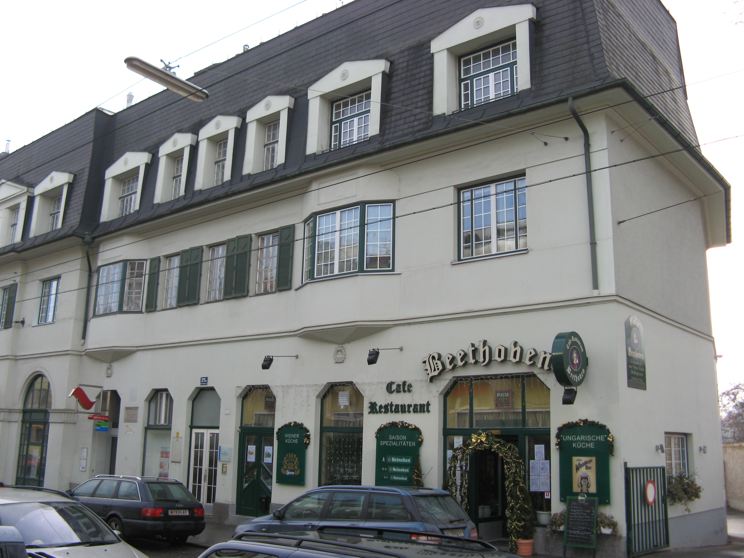 Haus Hetzendorfer Straße 75a in Wien-Meidling von Milos Kovar (1915); im Vorgängerbau wohnte 1823 Ludwig van Beethoven